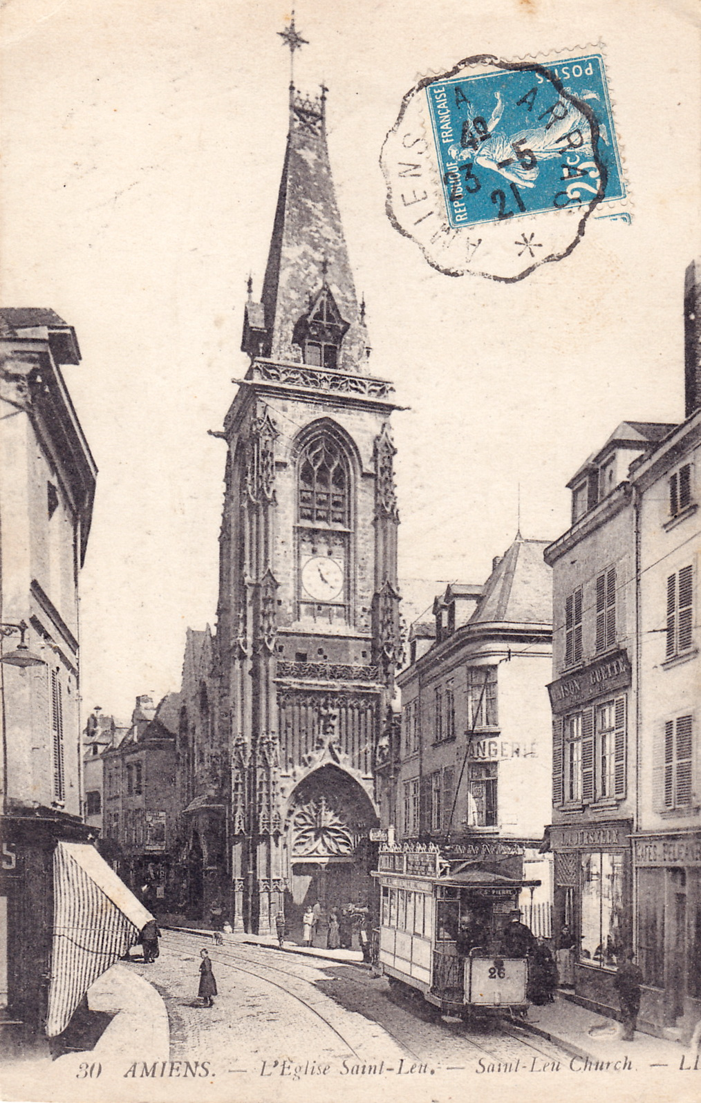 Carte postale ancienne éditée par LL, n°30 :AMIENS - L'Église Saint-LeuOblitération d'ambulant postal de la ligne d'Amiens à Arras. .